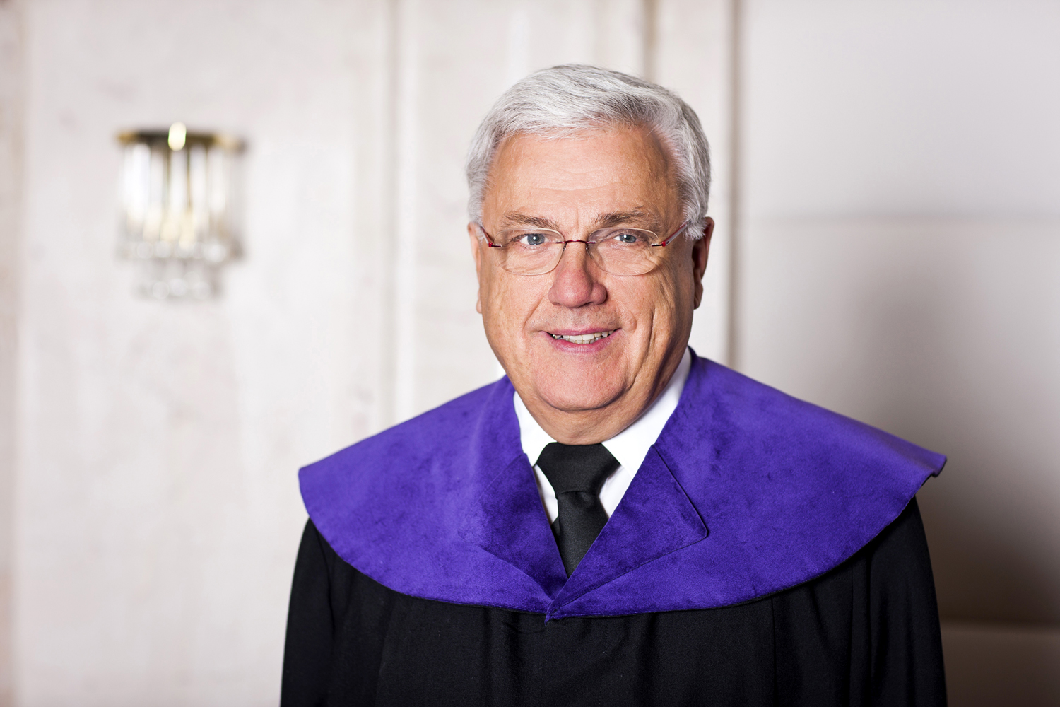 Dr. Rudolf Müller, Mitglied des österreichischen Verfassungsgerichtshofs seit 1998.